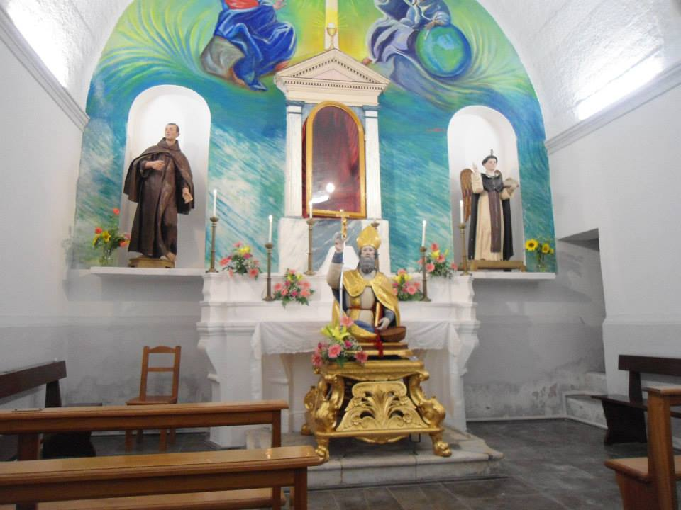 San donato Satriano di Lucania